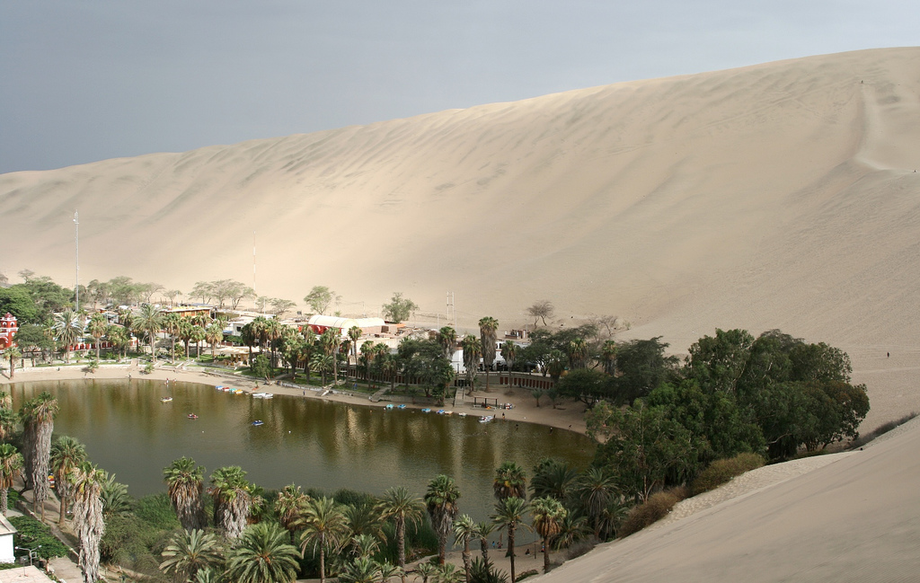 La laguna Huacachina es un oasis natural de aguas verde esmeralda en medio de las blancas arenas del desierto. Está ubicada al oeste de la ciudad de Ica, en Perú, y surgió debido al afloramiento de corrientes subterráneas. Alrededor de ella hay una abundante vegetación compuesta de palmeras, eucaliptos y los típicos huarangos que sirven para el descanso de las aves migratorias que pasan por esta región.